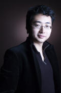 Foto van Yingdi Sun. Afkomstig van de Engelstalige Wikipedia. Door de maker (Allard Willemse voor de Stichting Lisztconcours) vrijgegeven.